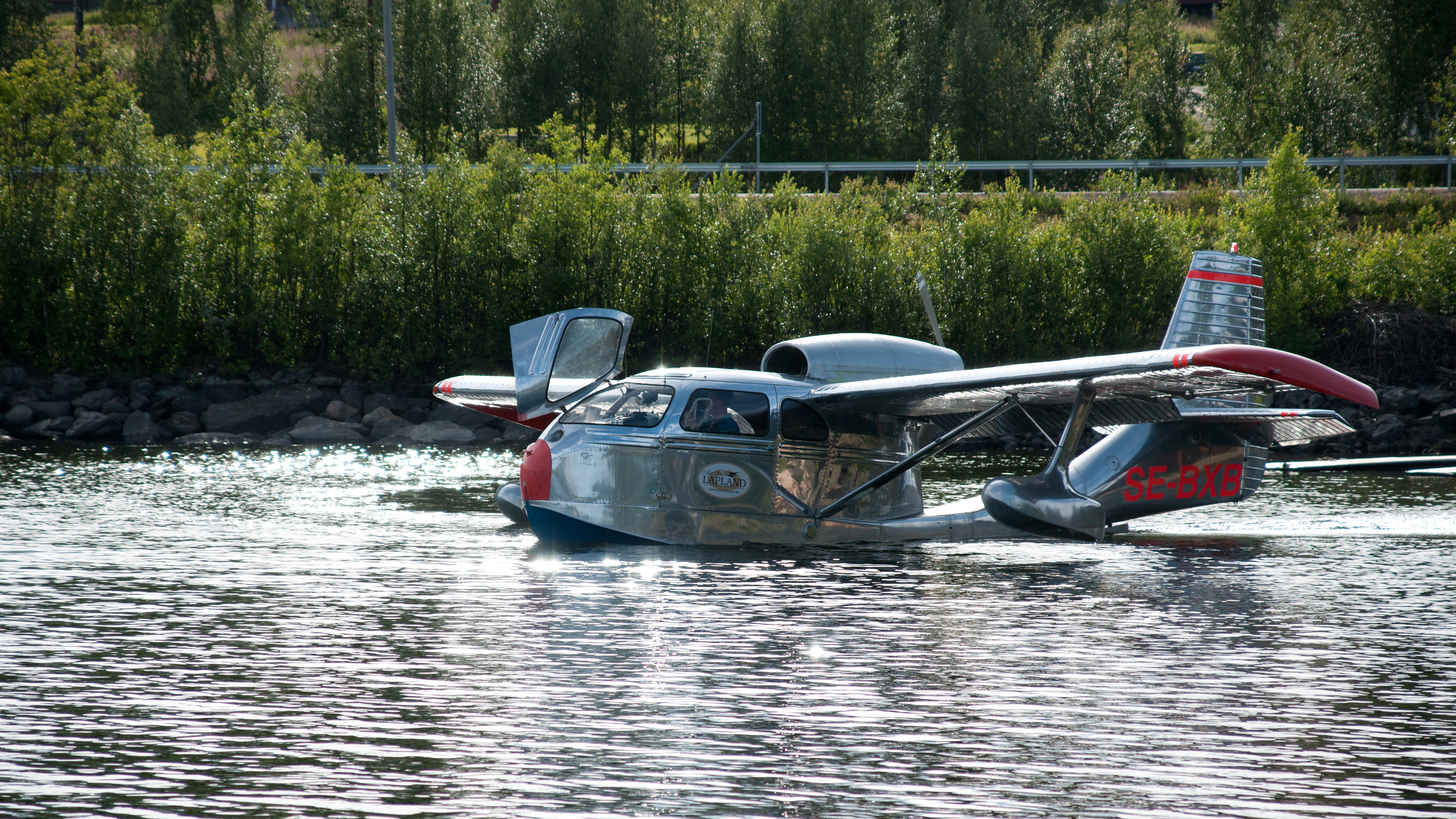 Located at Kyrkans Fjällgård, Jäckvik, Sweden.